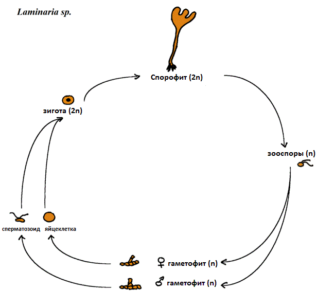 Схема жизненного цикла ламинарии